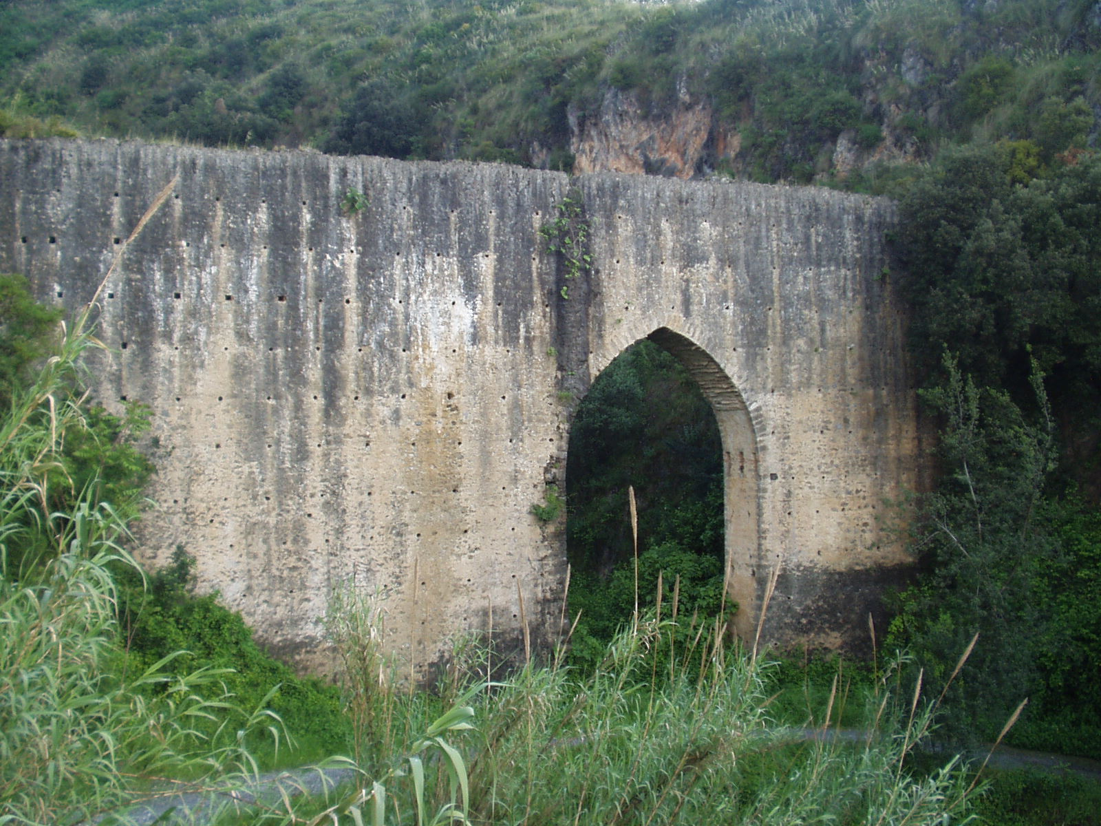 Acquedotto Normanno a Santa Maria del Cedro Cosenza